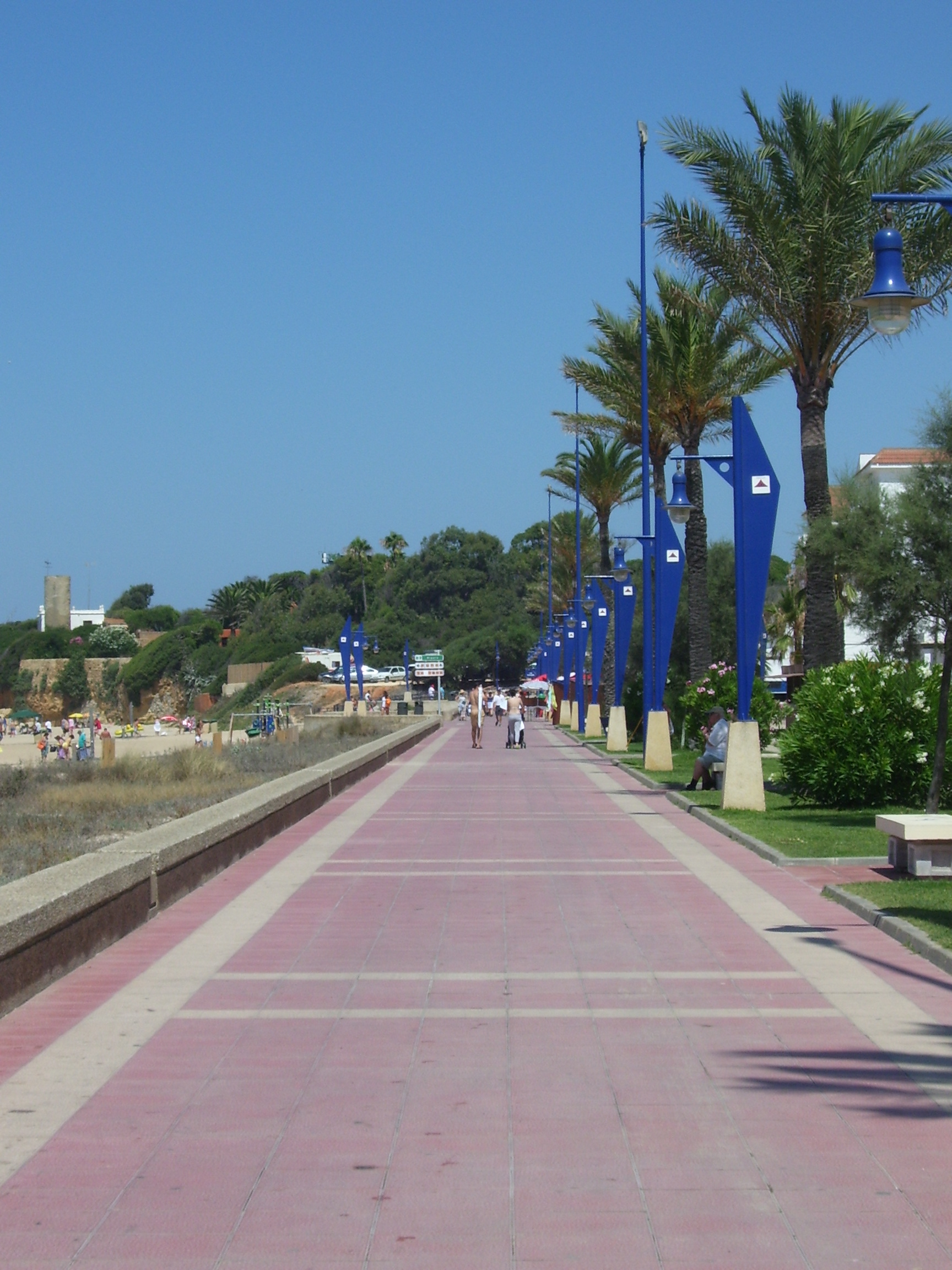 Vista, al mediodía, del paseo marítimo emplazado al lado de la Playa de la Barrosa, en Chiclana de la Frontera, (Cádiz, España).